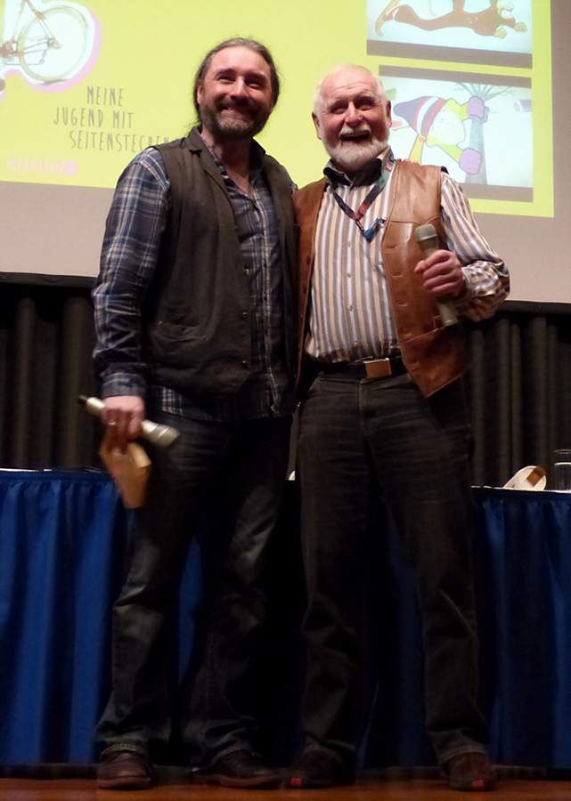 Tommy Krappweis und sein Vater Werner Krappweis auf einer Lesung aus dem gemeinsamen Buch Sportlerkind, HobbitCon, Bonn 2016.